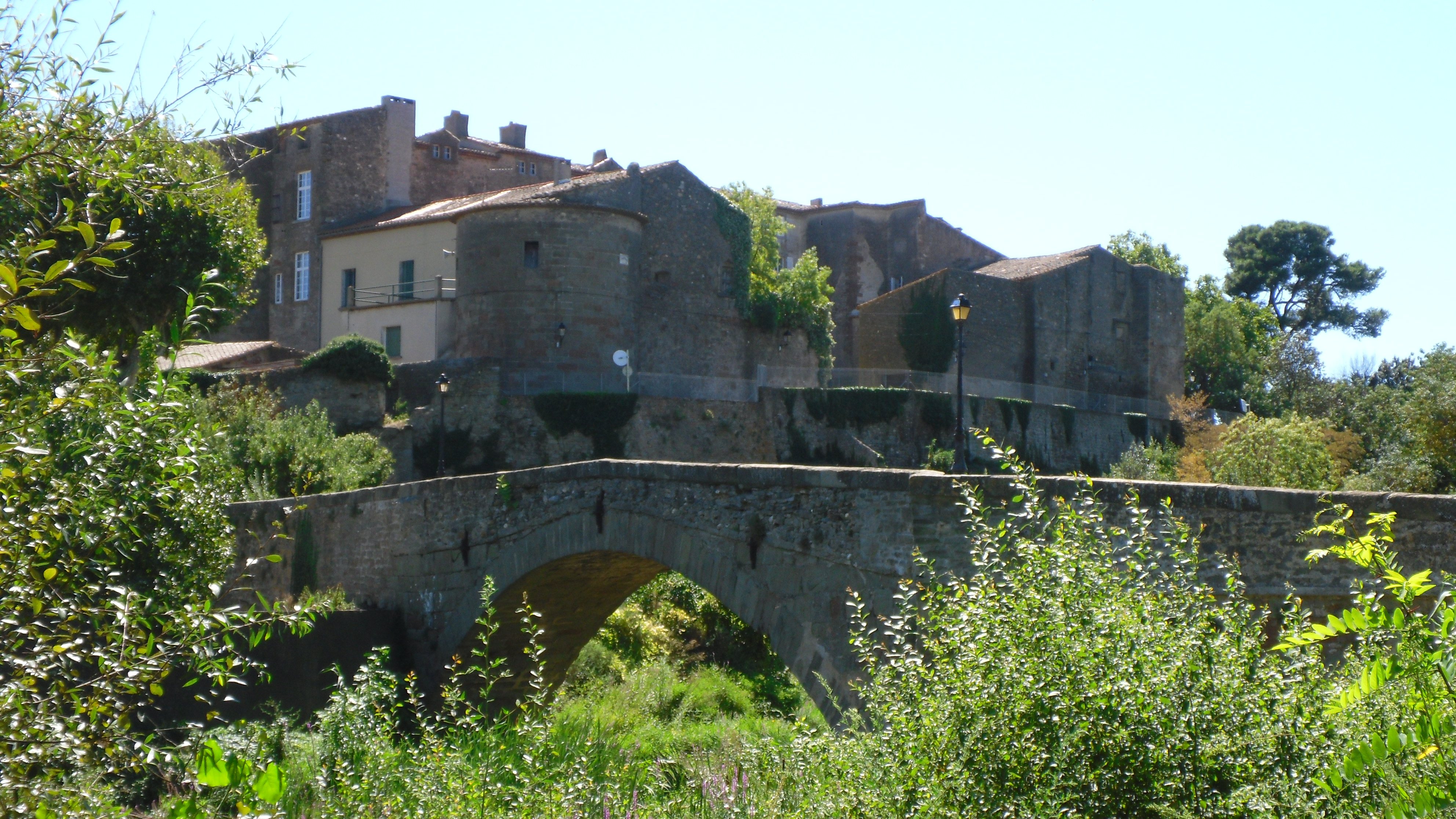 Chateau de Rieux Minervois